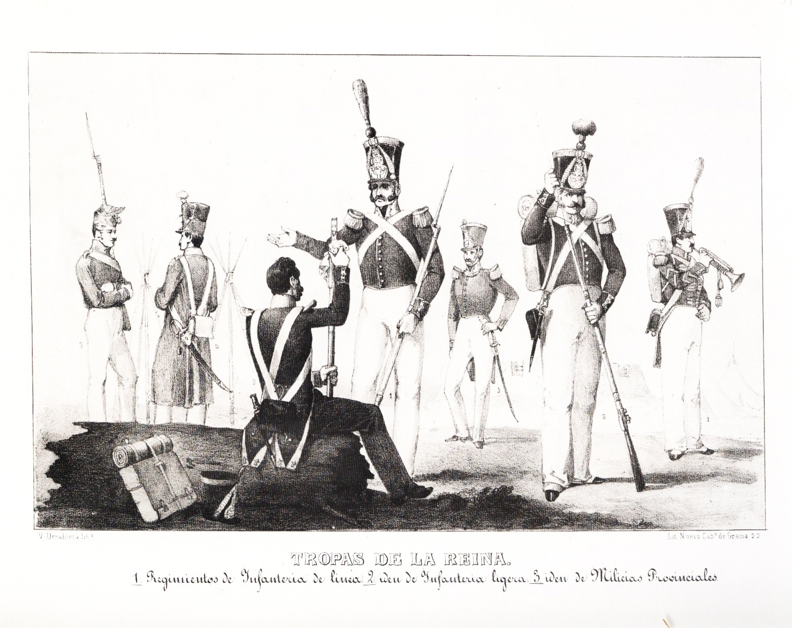 Tropas de la Reina (1). "Albúm de las Tropas Carlistas del Norte". Madrid, sin fecha. (184?)